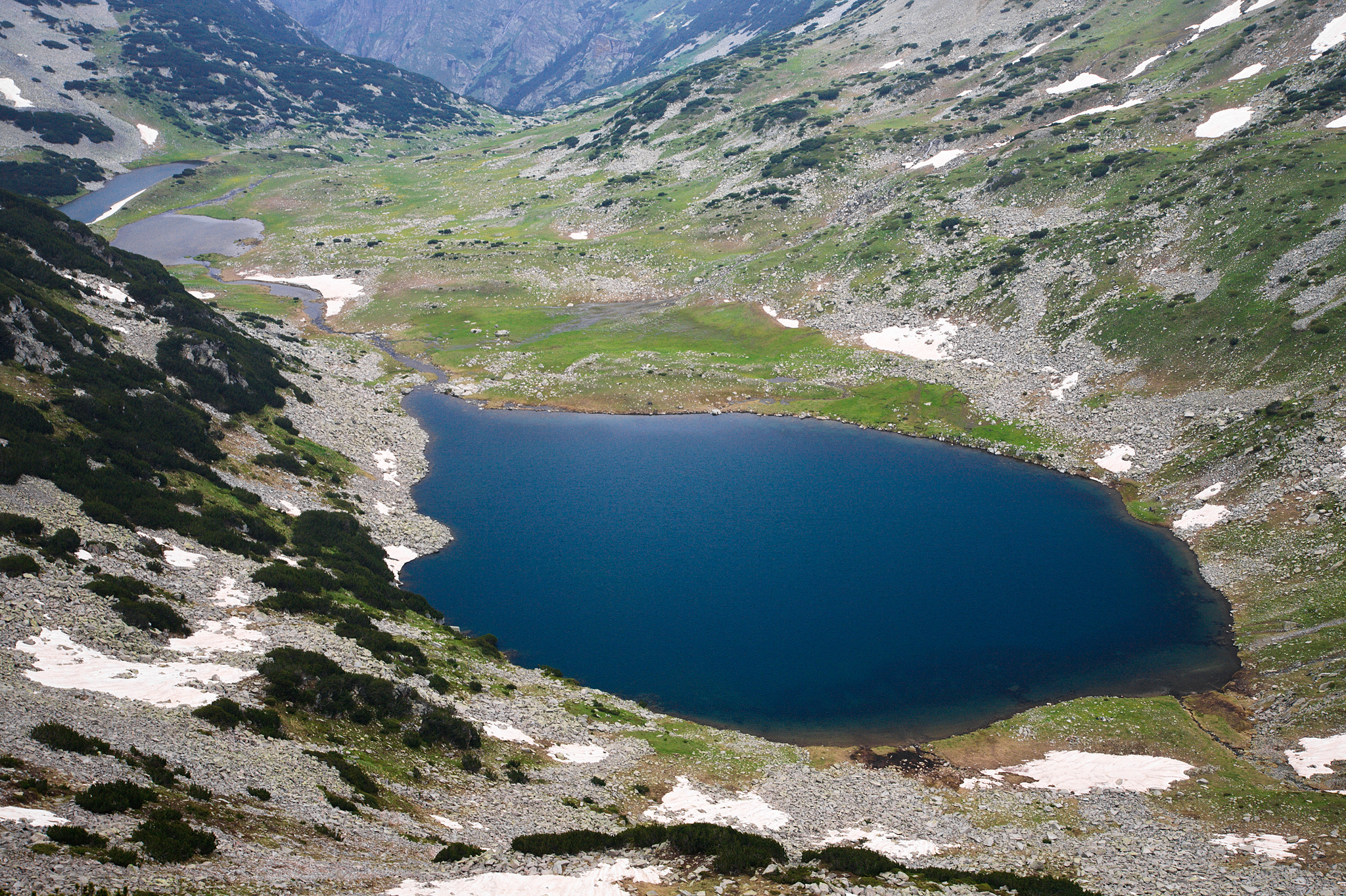 Пирин, Пирин, Влахинското езеро